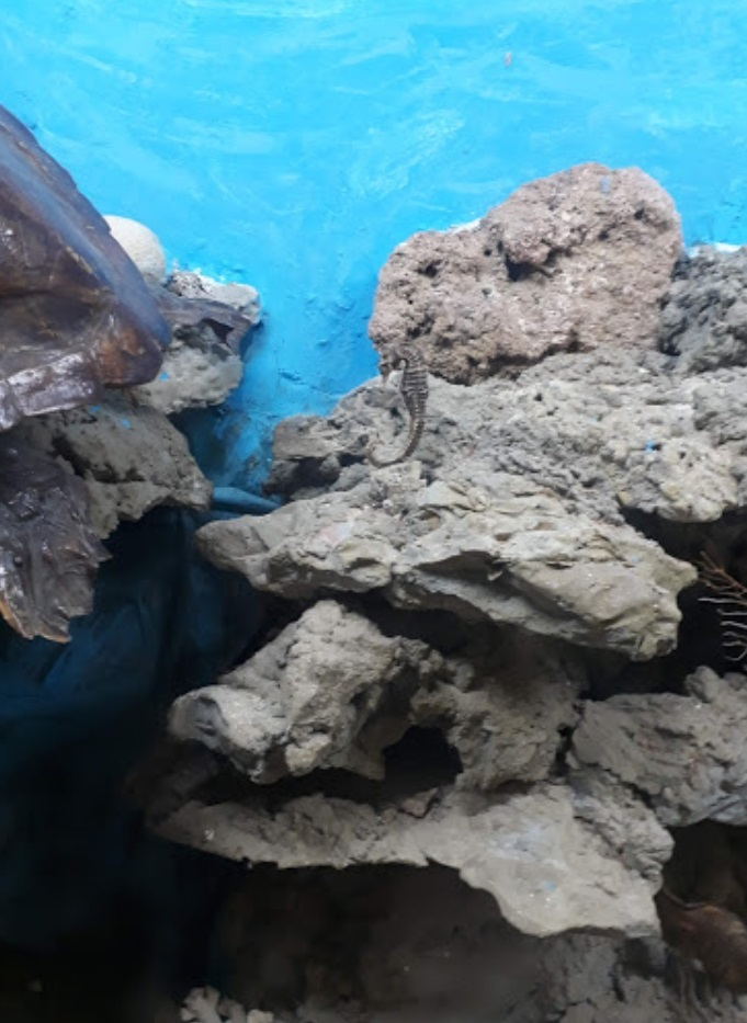 les roches marines goréennes